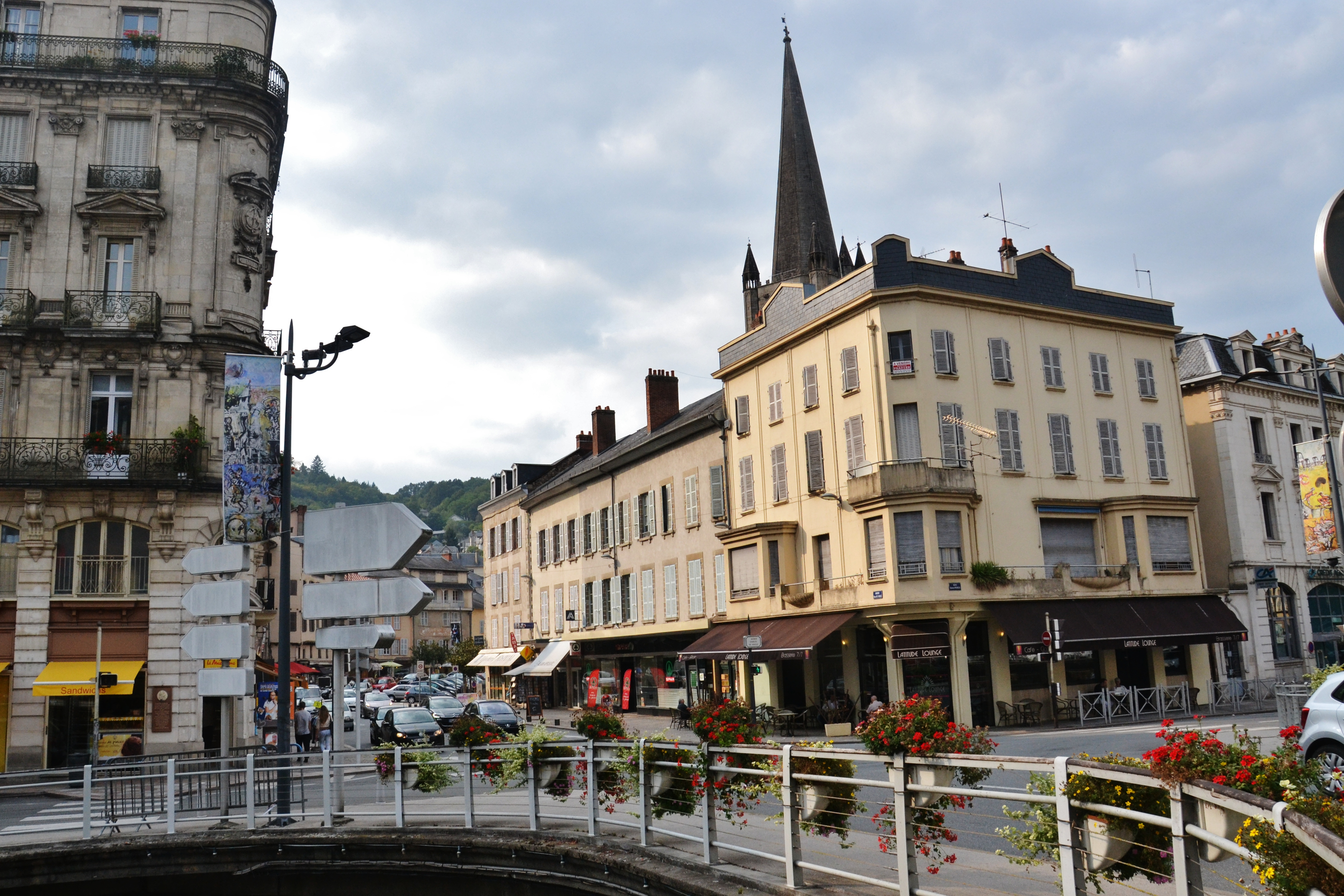 Le centre-ville de Tulle (Corrèze, France)